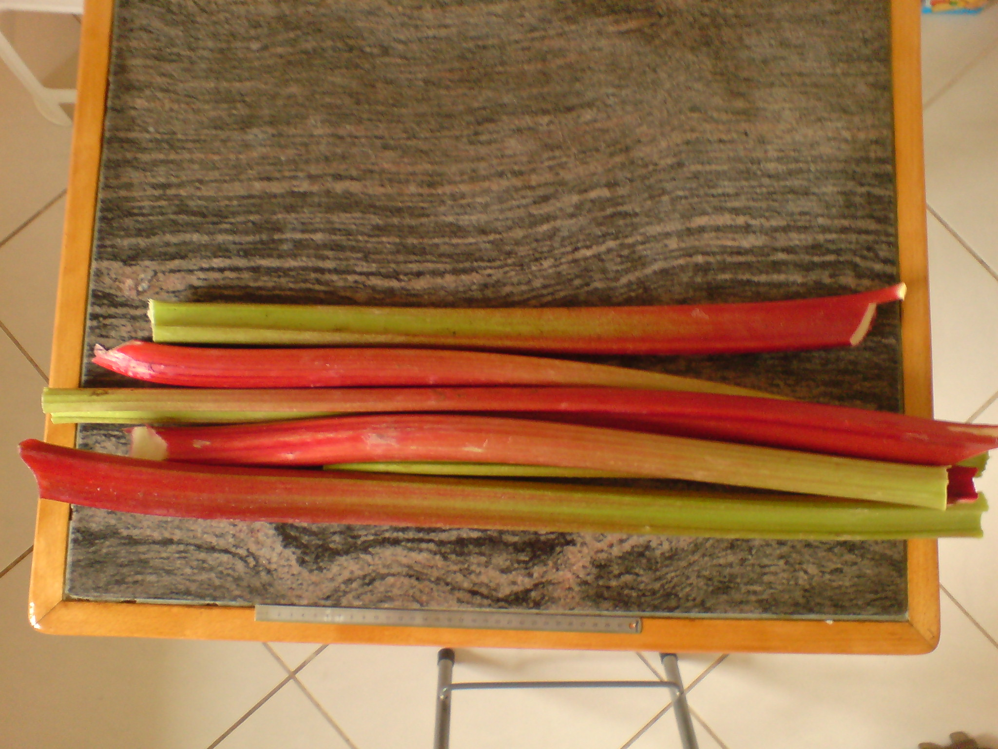 Grande tige de rhubarbe